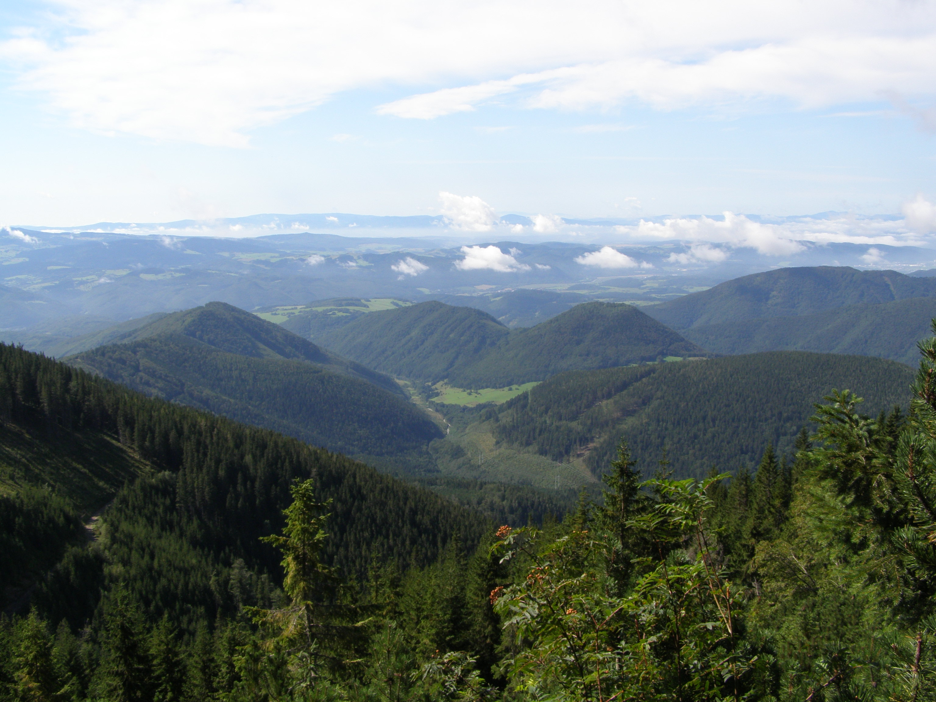 Nízké Tatry, Ďumbierské Tatry, pohled z úbočí vrcholu Prašivá (1652 m) na jihozápad: Hiadieľská dolina, vlevo vrchol Kochuľa (975 m), vpravo Horka (1075 m) a za odlesněným pásem pak výrazný vrchol Hradiště (958 m)